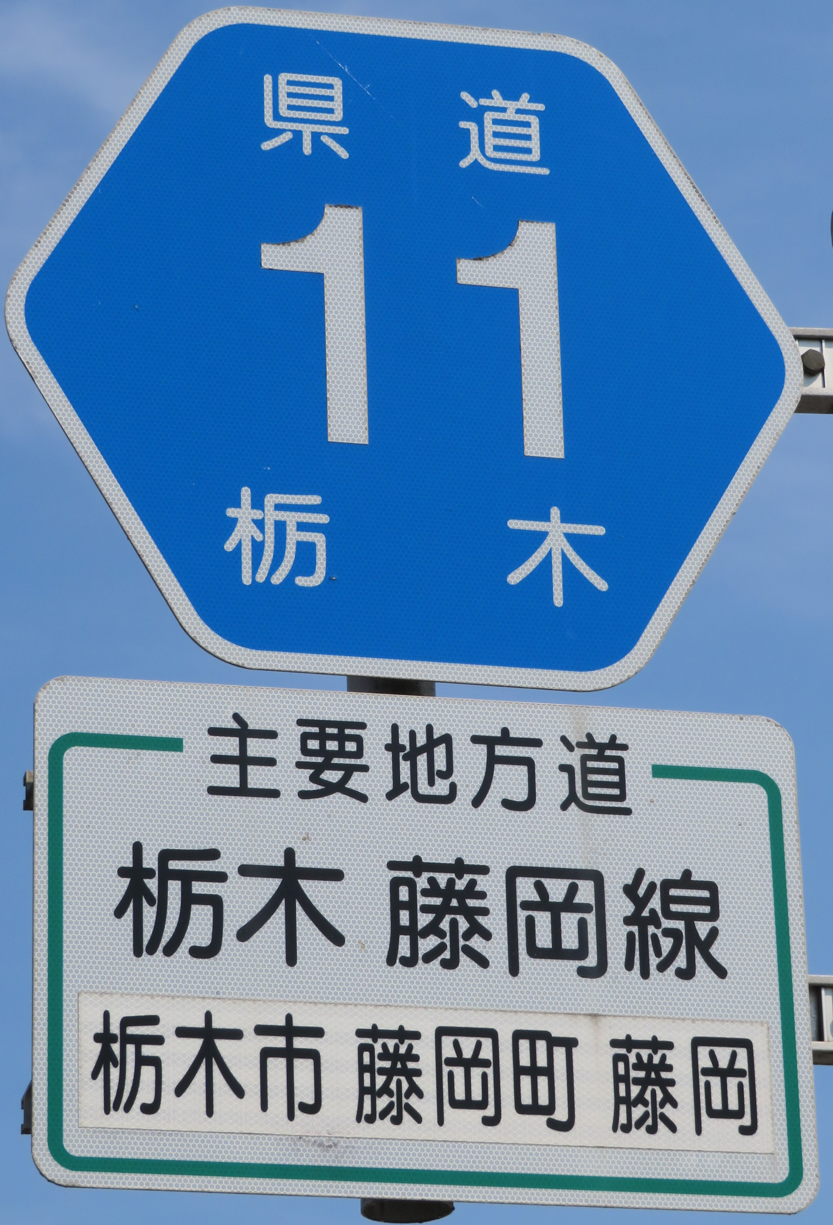 栃木県道11号線（主要地方道）の路線番号標識 Canon PowerShot SX720 HS